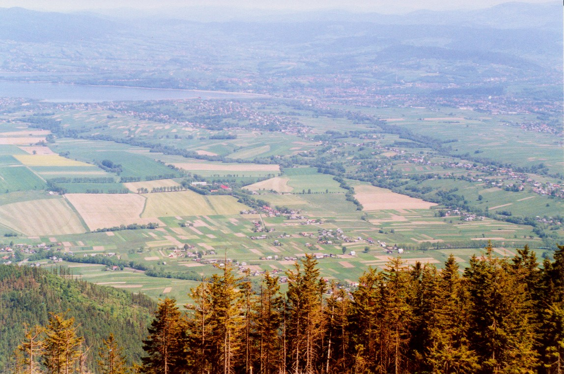 Widok ze Skrzycznego na Jezioro Żywieckie..